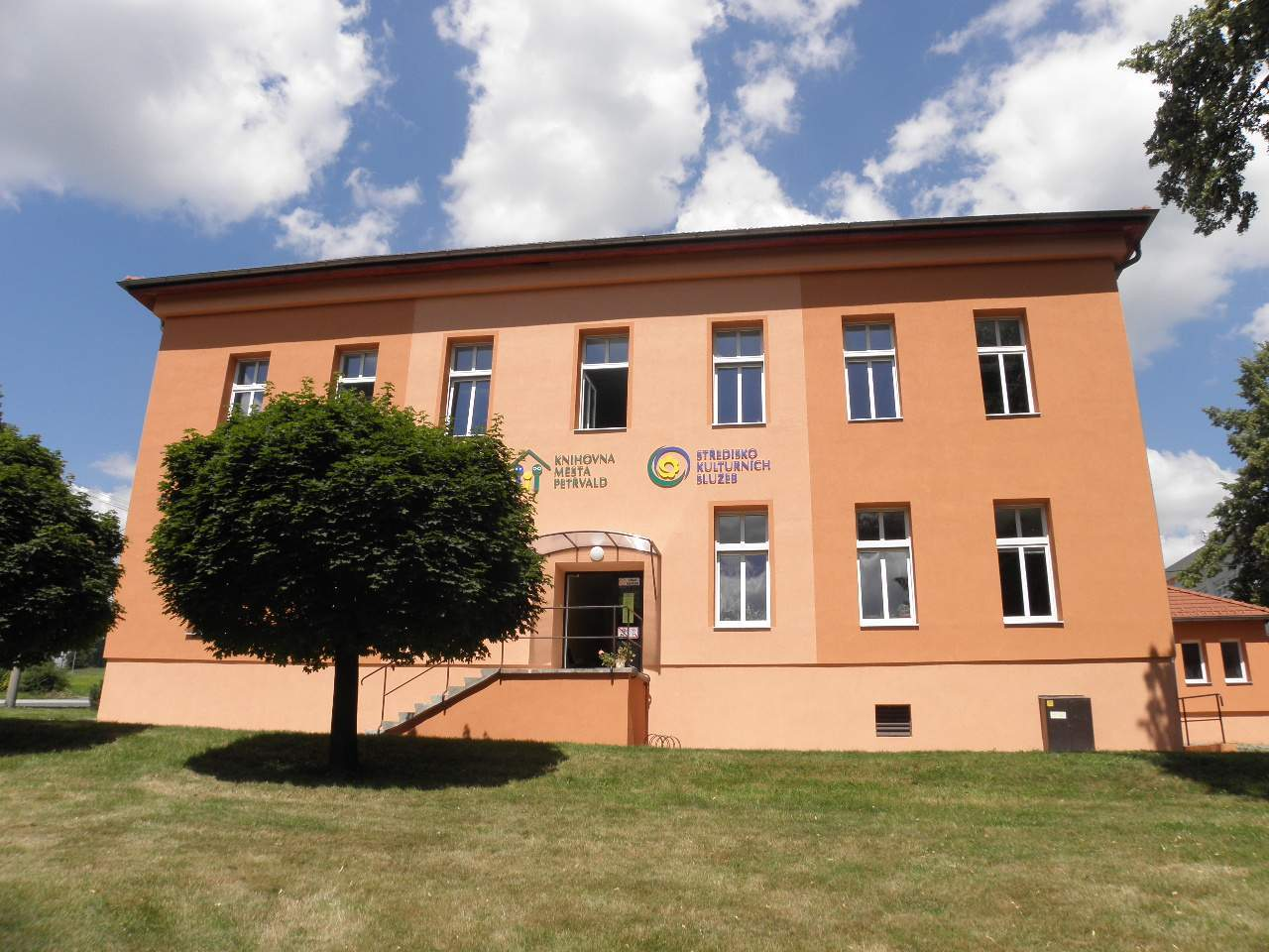 Budova Střediska kulturních služeb a Knihovny města Petřvald, K Muzeu čp. 150. Knihovna sídlí v 1. patře budovy.